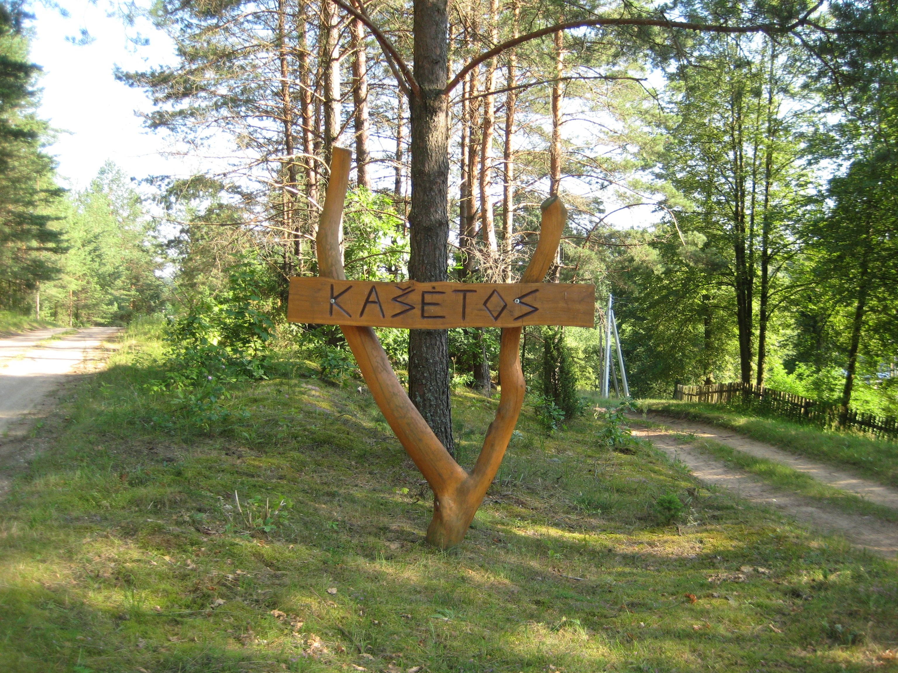 Kašėtos 65271, Lithuania